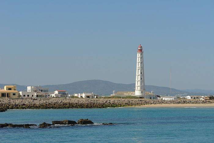 Ilha da Culatra in Ria Formosa, Portugal. Photography: Osvaldo Gago